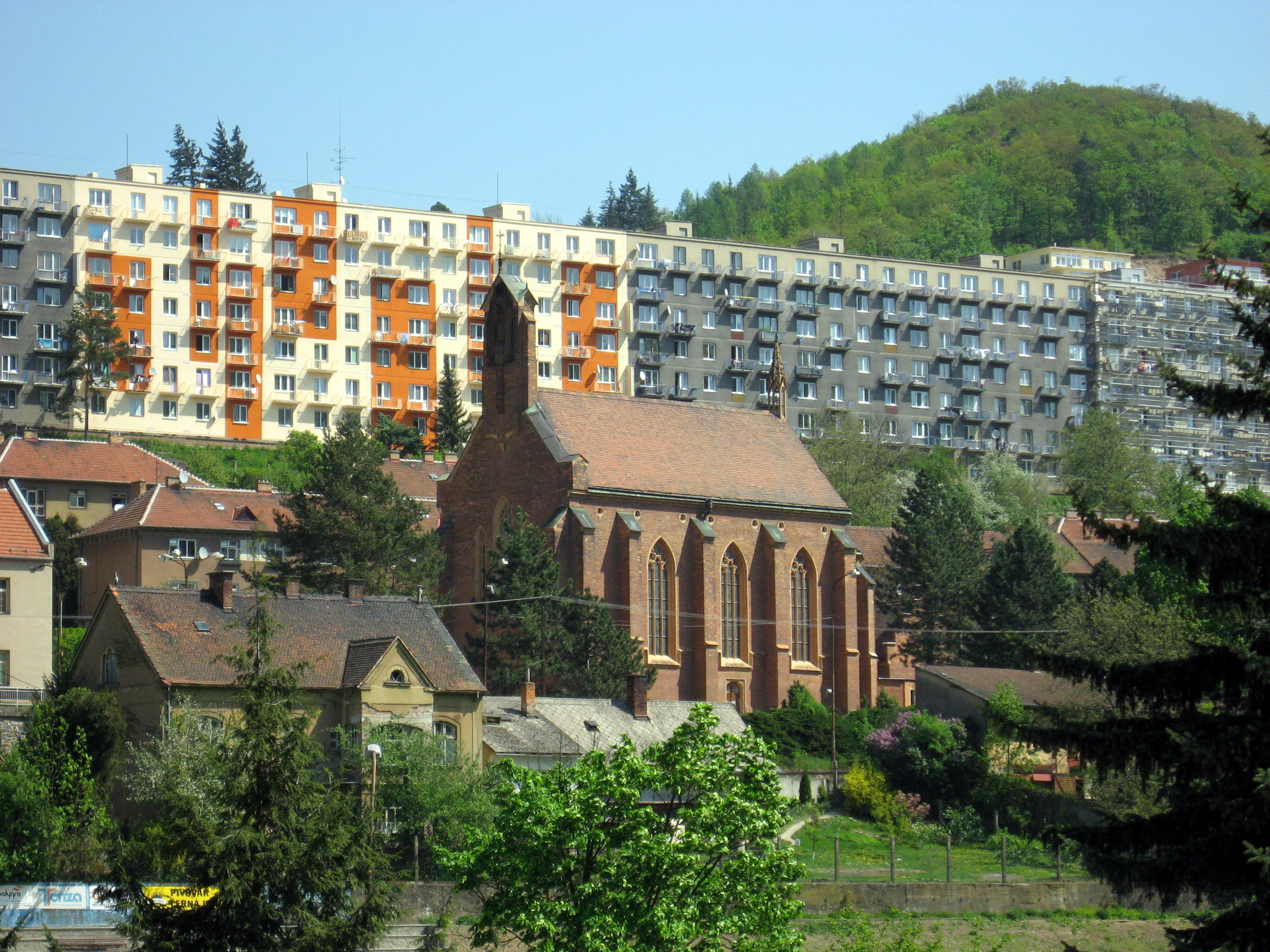 Adamov, kostel sv. Barbory a zděný bytový blok tzv. Hradčany